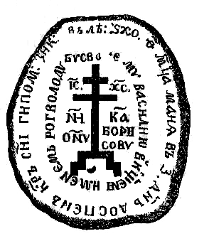 Рисунок Рогволодова камня снятый Тышкевичем К.П. в 1847г. и опубликованный в книге "Труды Первого археологического съезда в Москве 1869г." — М., 1871 Т. 1.